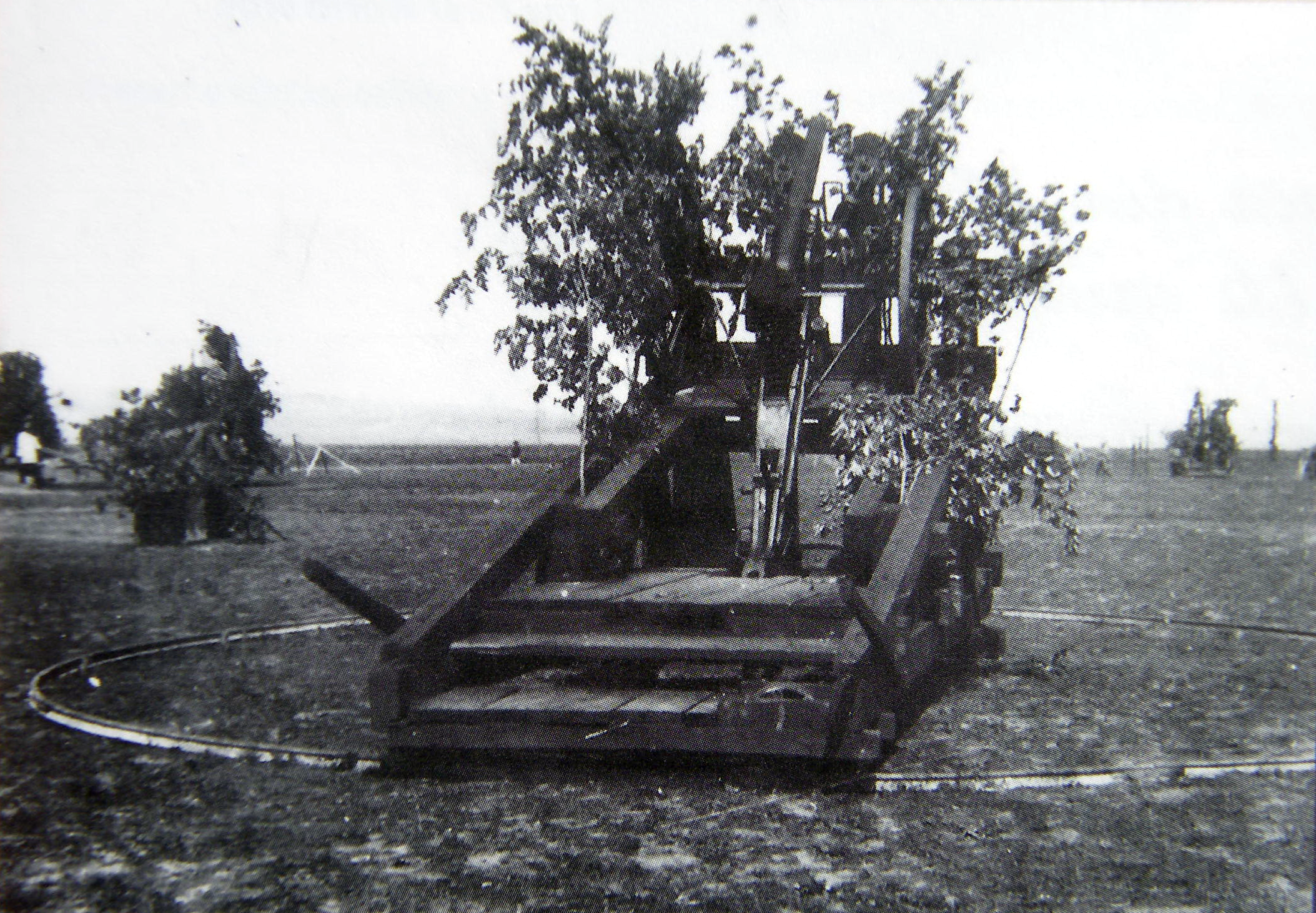 Tun antiaerian de 57 mm sistem Negrei (România) in poziţie de luptă